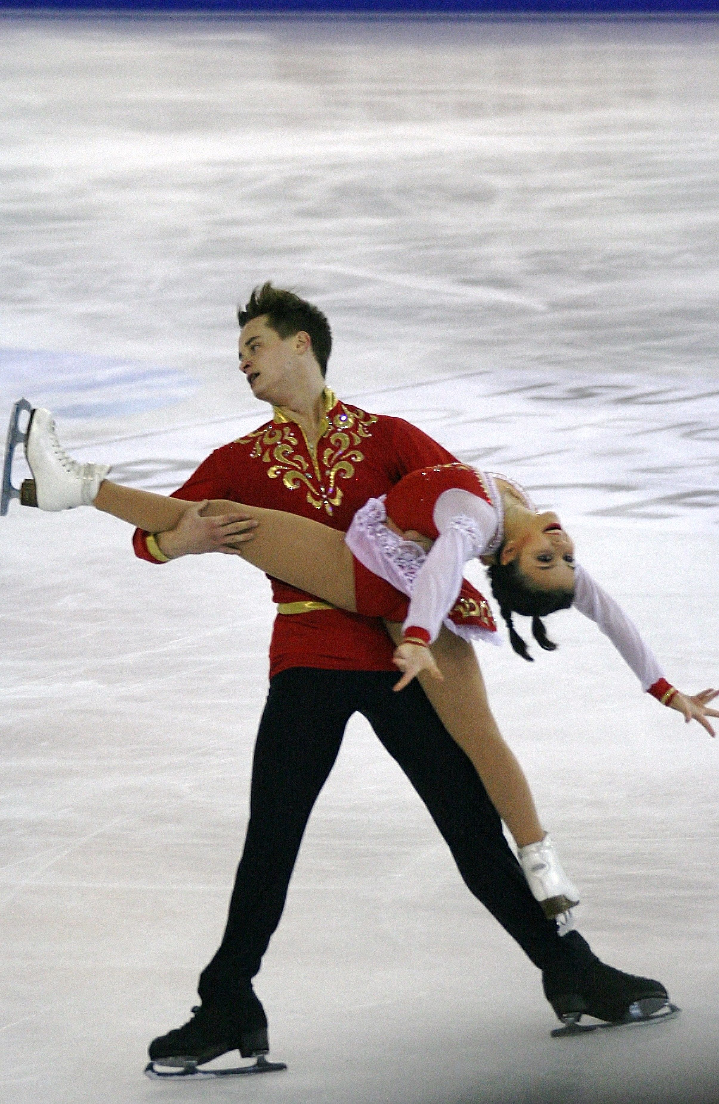 Лина Фёдорова и Максим Мирошкин (Россия) на финале Гран-при среди юниоров 2014-2015.